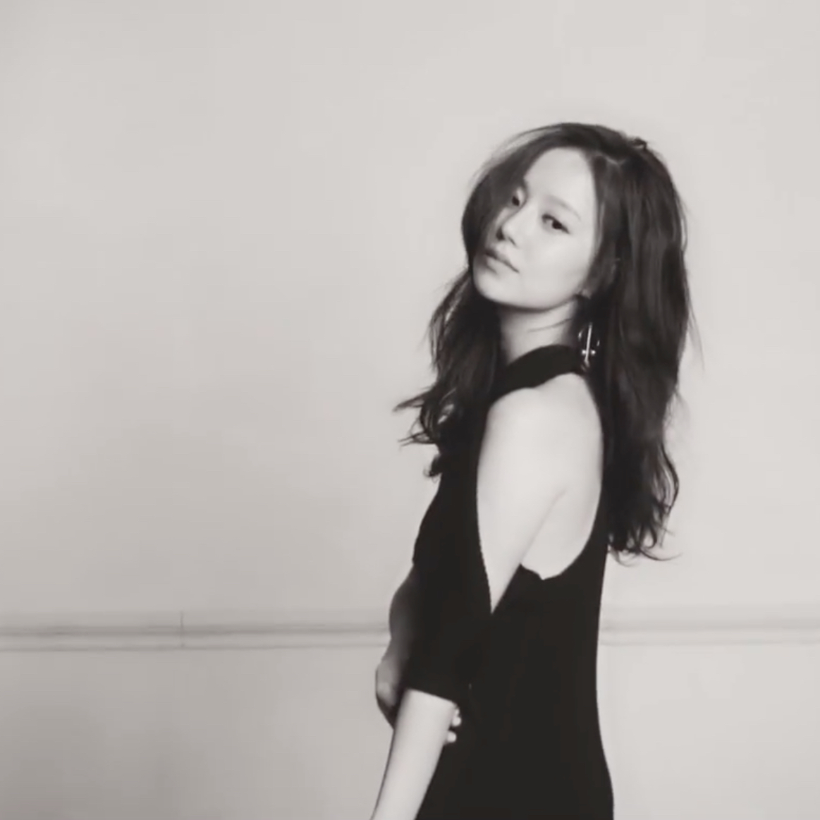 문채원이 차분하고, 느릿하지만 감정이 충만한 말투로 오랜만에 그간의 안부를 전해왔다. 얼마 전 부모님과 부산에 다녀왔고, 구두보다는 운동화가 편해졌으며 적당한 수다가 필요한 것 같다는 그녀의 요즘에 대하여.